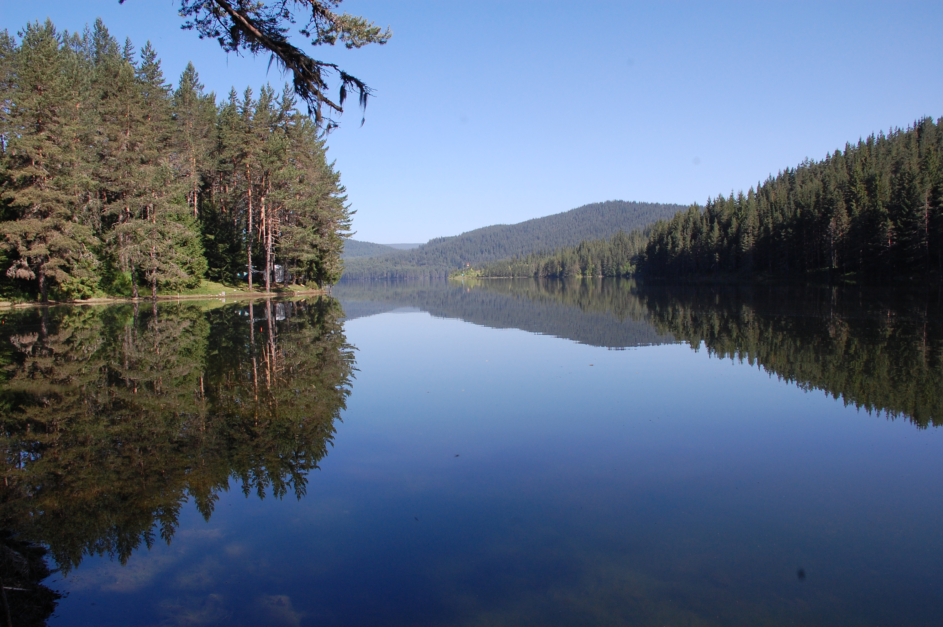 Красотата на язовир Голям Беглик